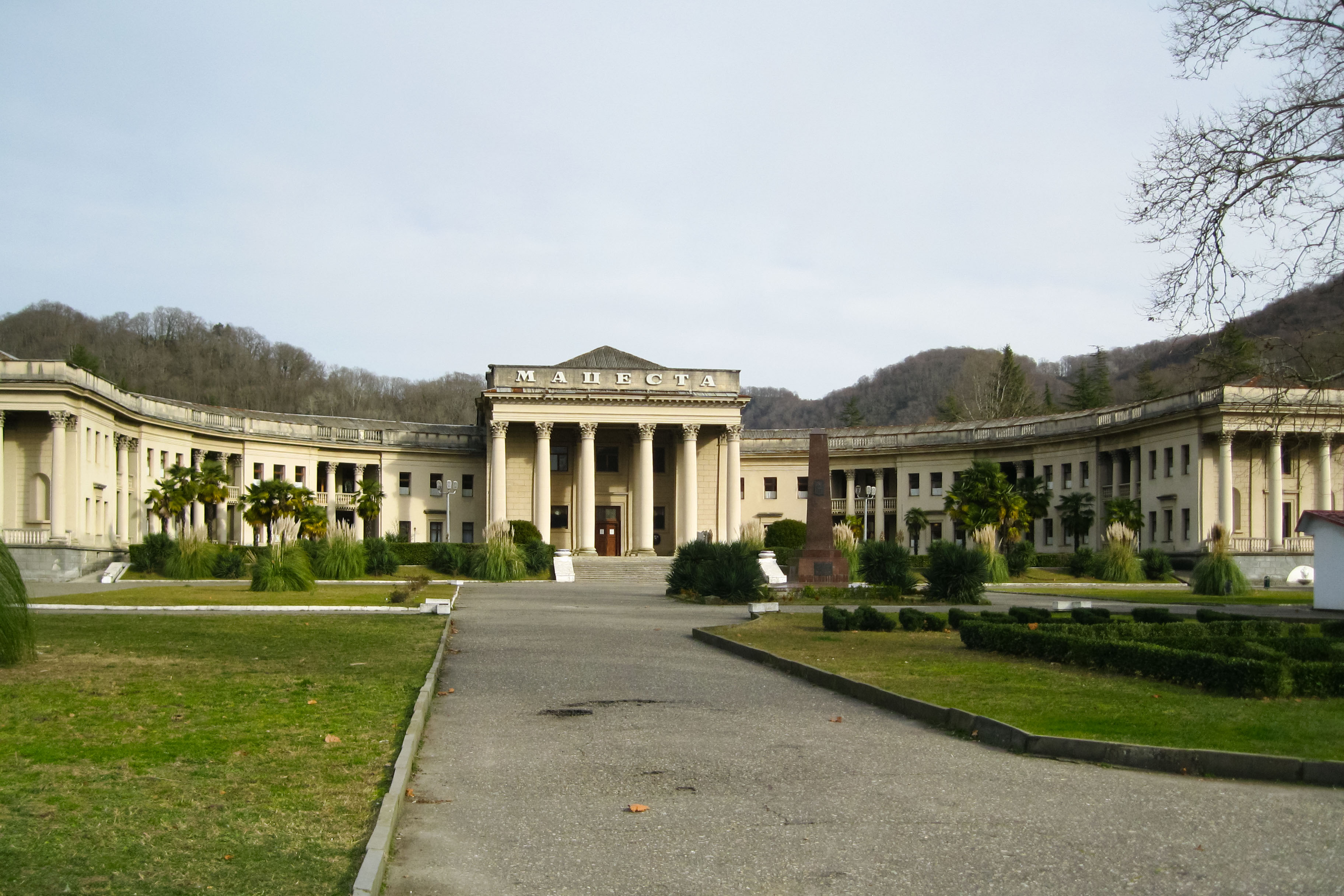 Ванное здание на Старой Мацесте в Сочи, Россия